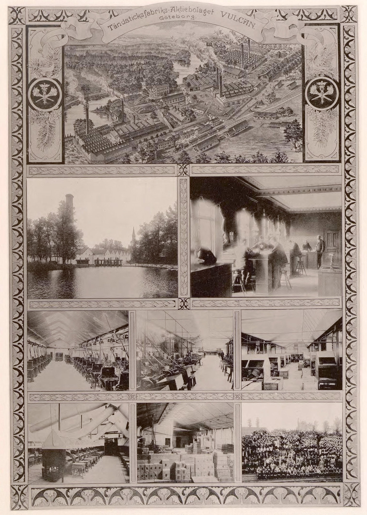 Tändsticksaktiebolaget Vulcan